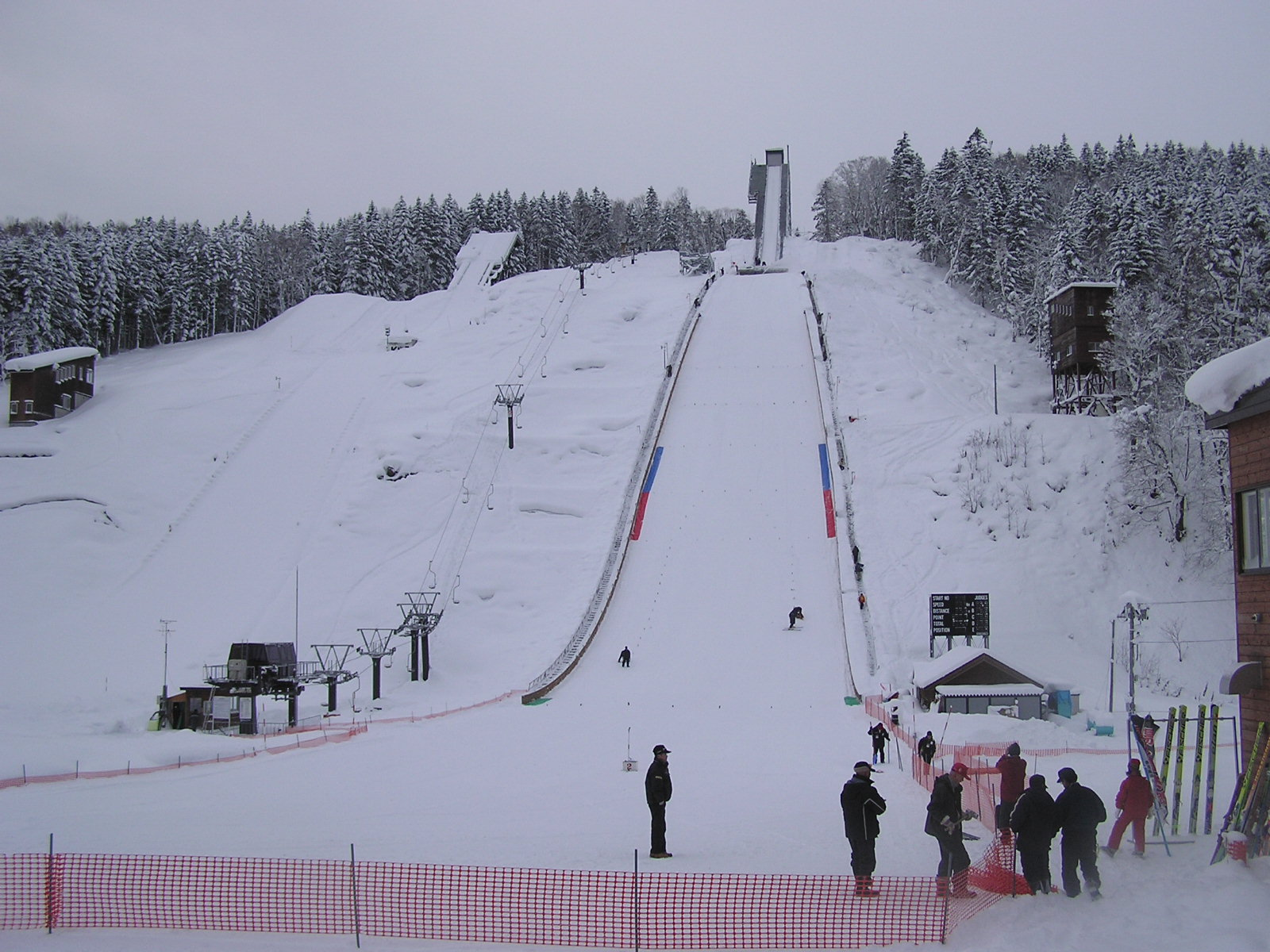 名寄ピヤシリシャンツェ